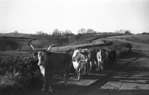 Landetako eta bordelar arrazako behiak ziburun, 1937